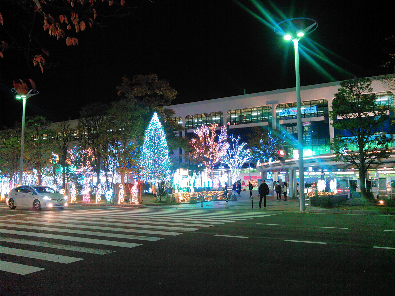 ビッグツリーページェント・フェスタ_in_KORIYAMA 会場をアーケード入口付近から望む